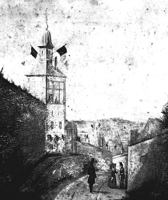 Peinture anonyme de 1832. Tour de guet de l'abbaye de Saint-Laurent Liège, devenu hôpital militaire.